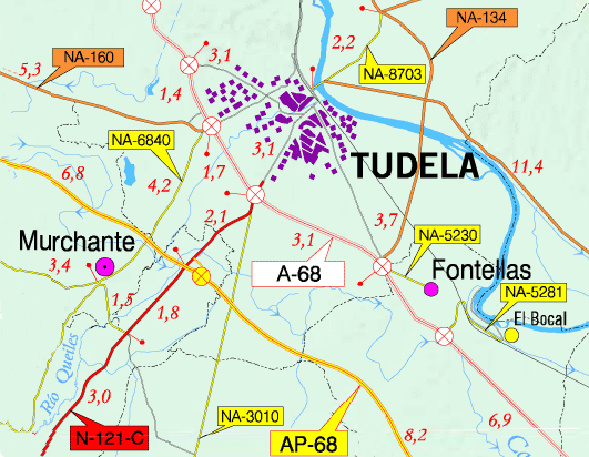 Carreteras de la ribera de Navarra